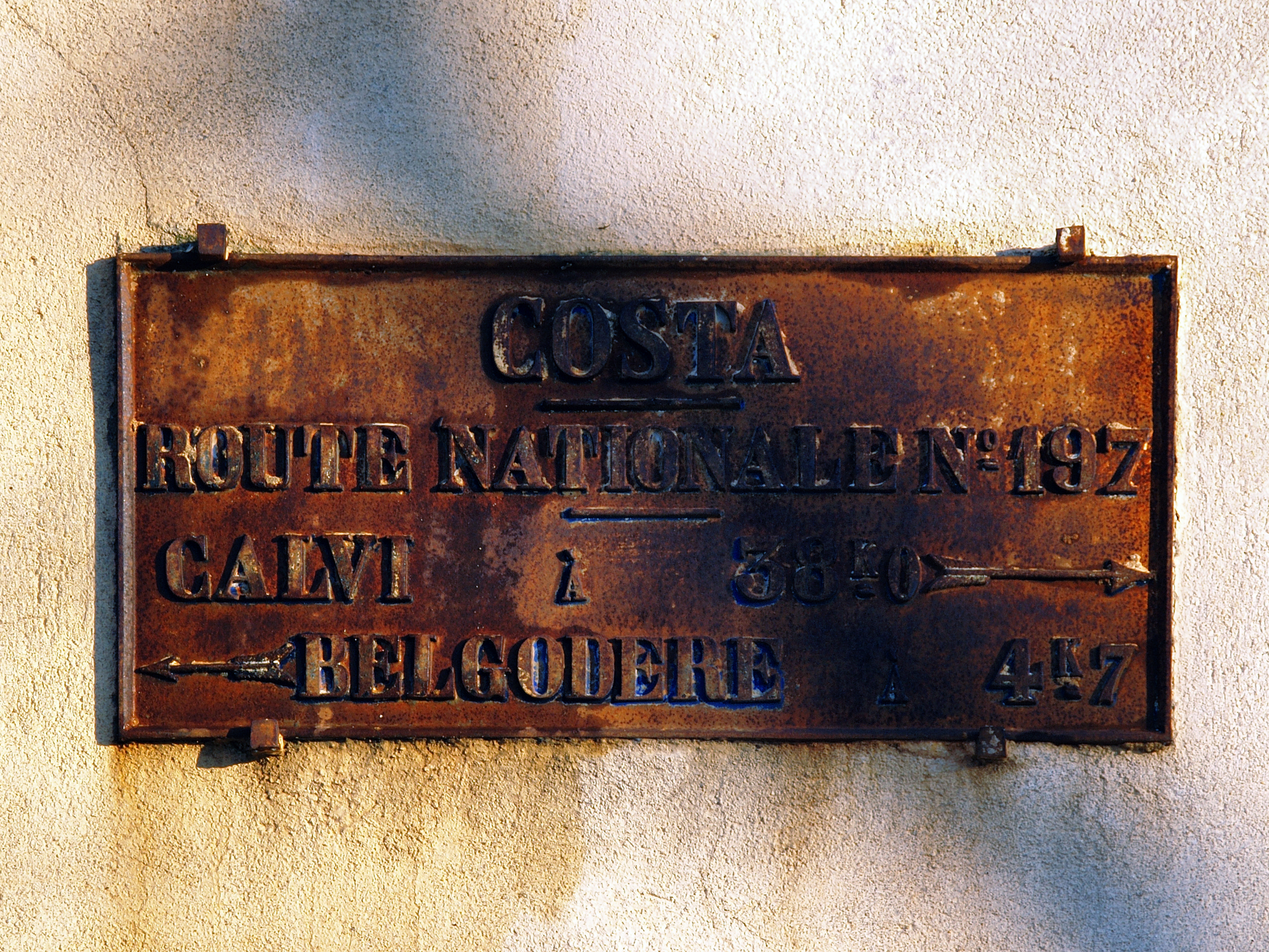 Costa, Balagne (Haute-Corse) - Ancienne signalisation de la route nationale 197 à Costa -section Lumio à Belgodère devenue aujourd'hui la D71 dite « route corniche de la Balagne ».